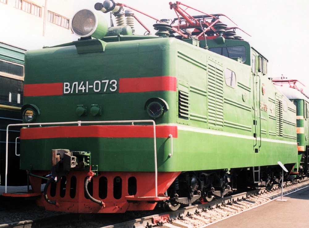 Электровоз ВЛ41-073 в музее Ростов-на-Дону